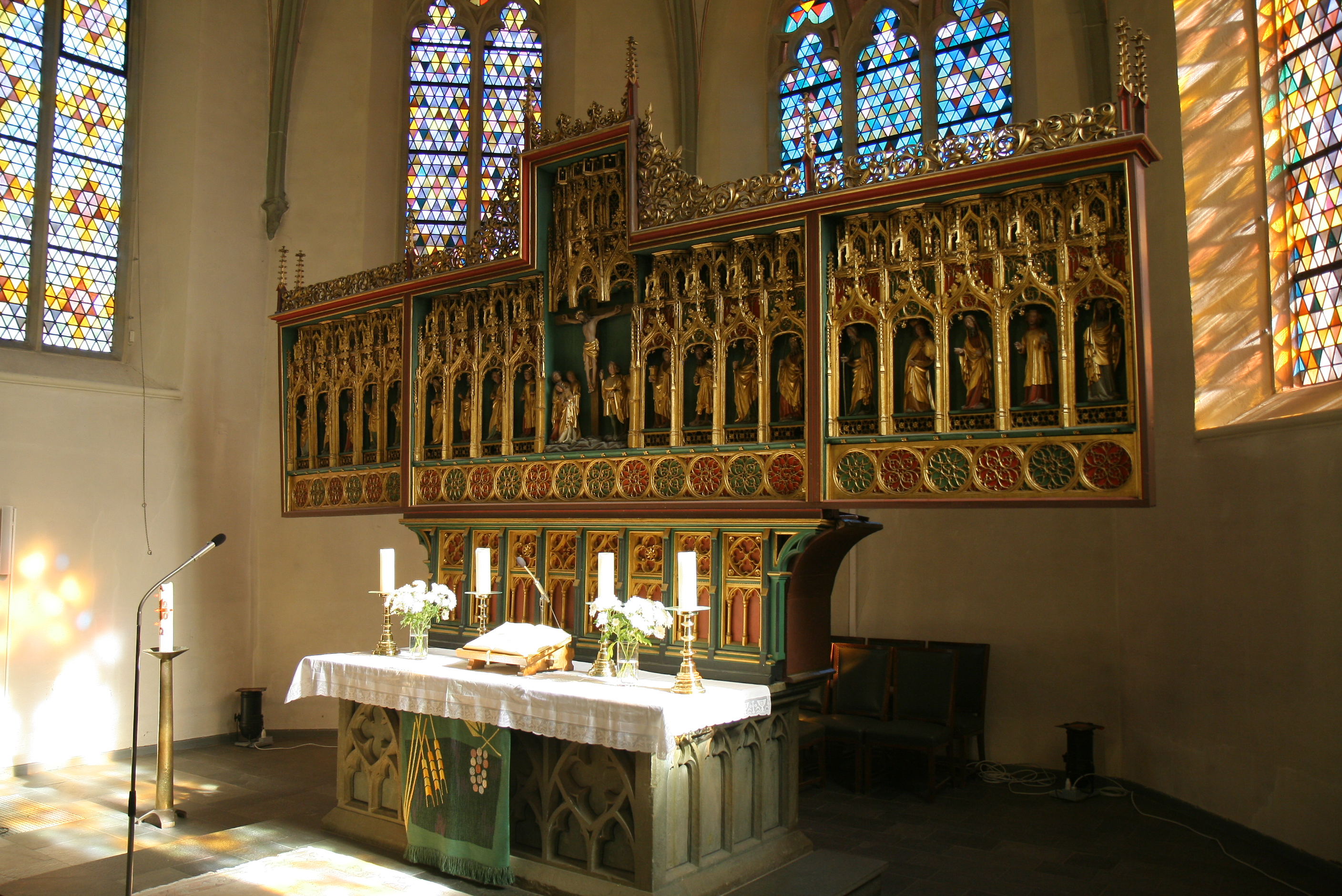 Altar mit spätgotischem Klappaltaraufsatz in der Obersten Stadtkirche in Iserlohn.